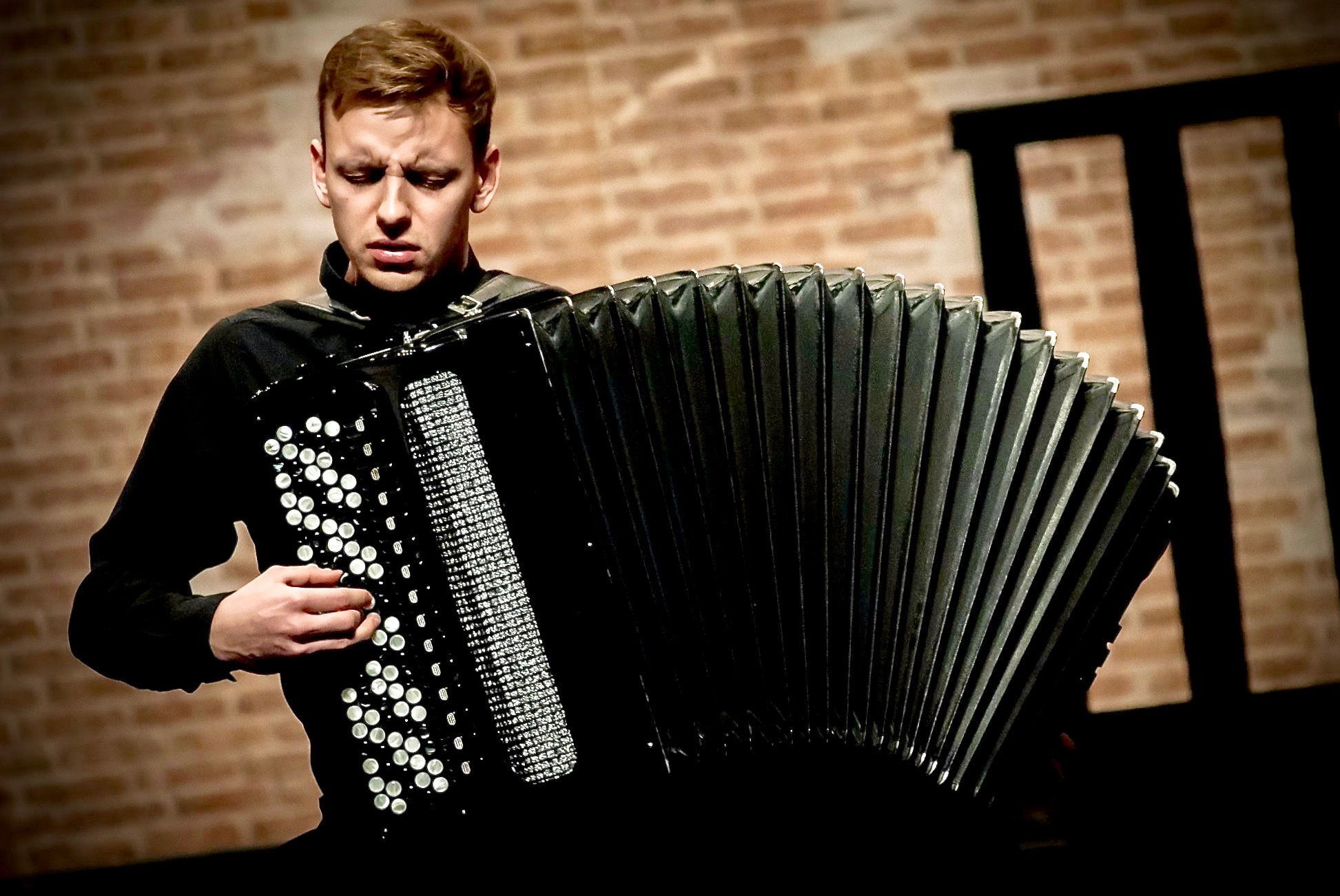 Patryk Sztabiński